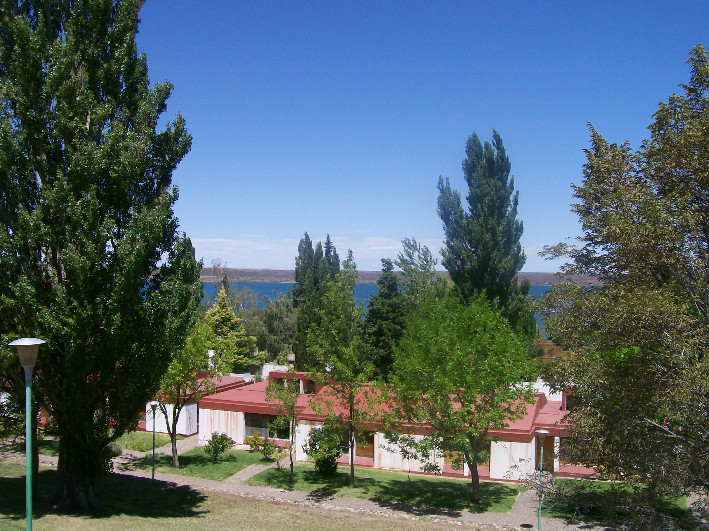 Villa el Chocón.